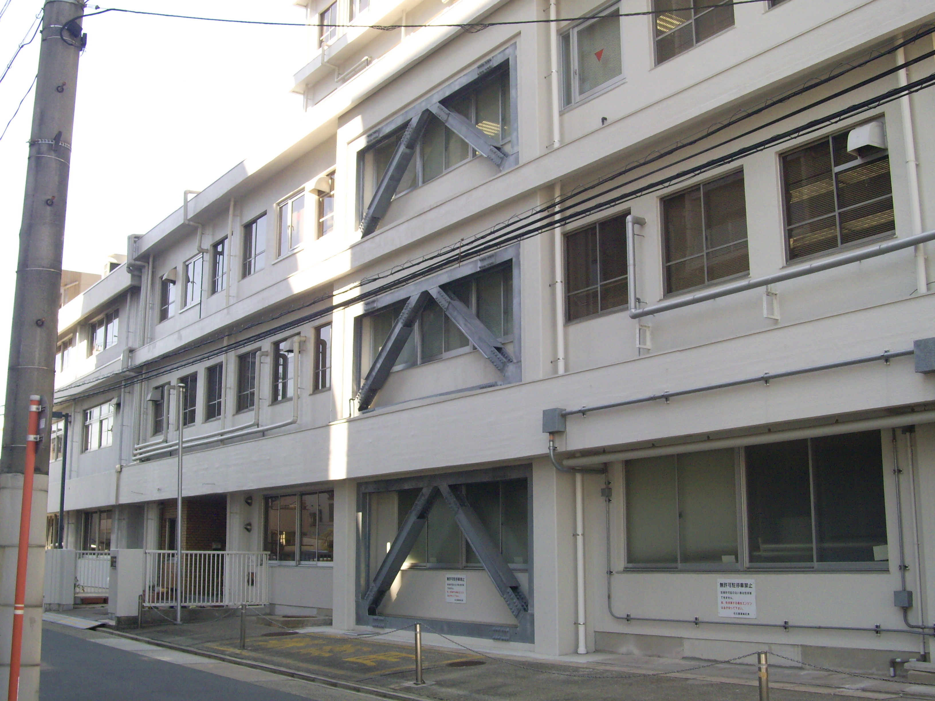 JR東海・東海鉄道事業本部（在来線）の運転士と車掌が所属する名古屋運輸区の建物 ㊟カメラを起動すると日付機能が出荷時のものに初期化されるため、ファイル履歴の投稿日時とメタデータの原画像データの生成日時が異なります（本概要欄の下記日付が撮影日）